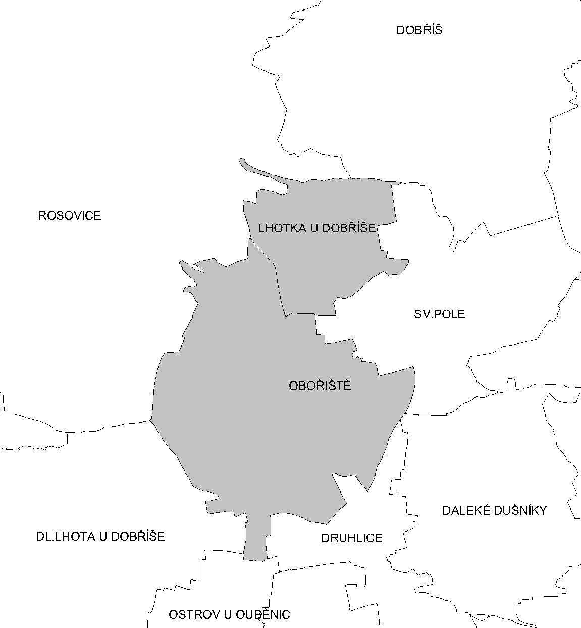 Katastr Obořiště